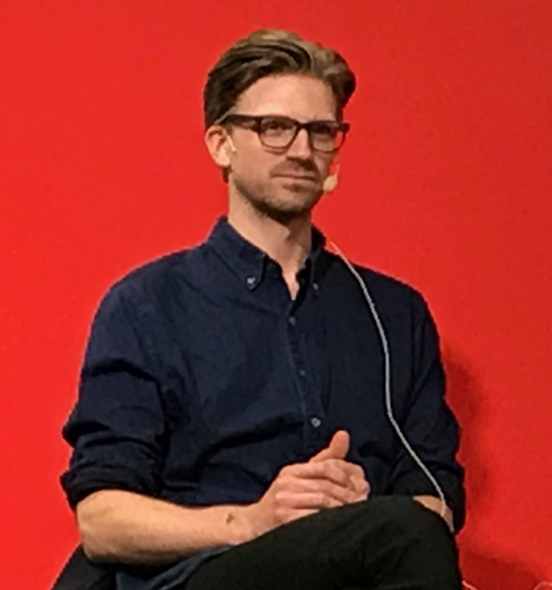 Serieskaparen Karl Johnsson på Bokmässan 2018